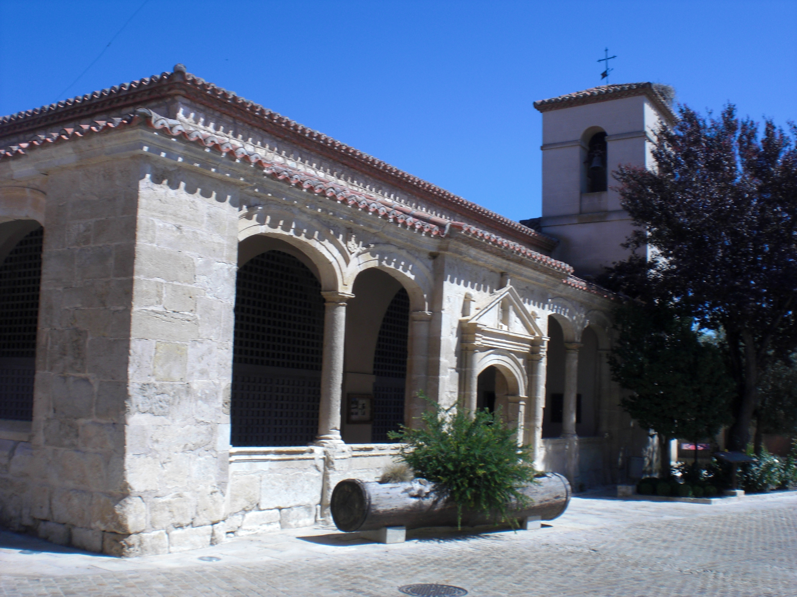 Sankta Petro